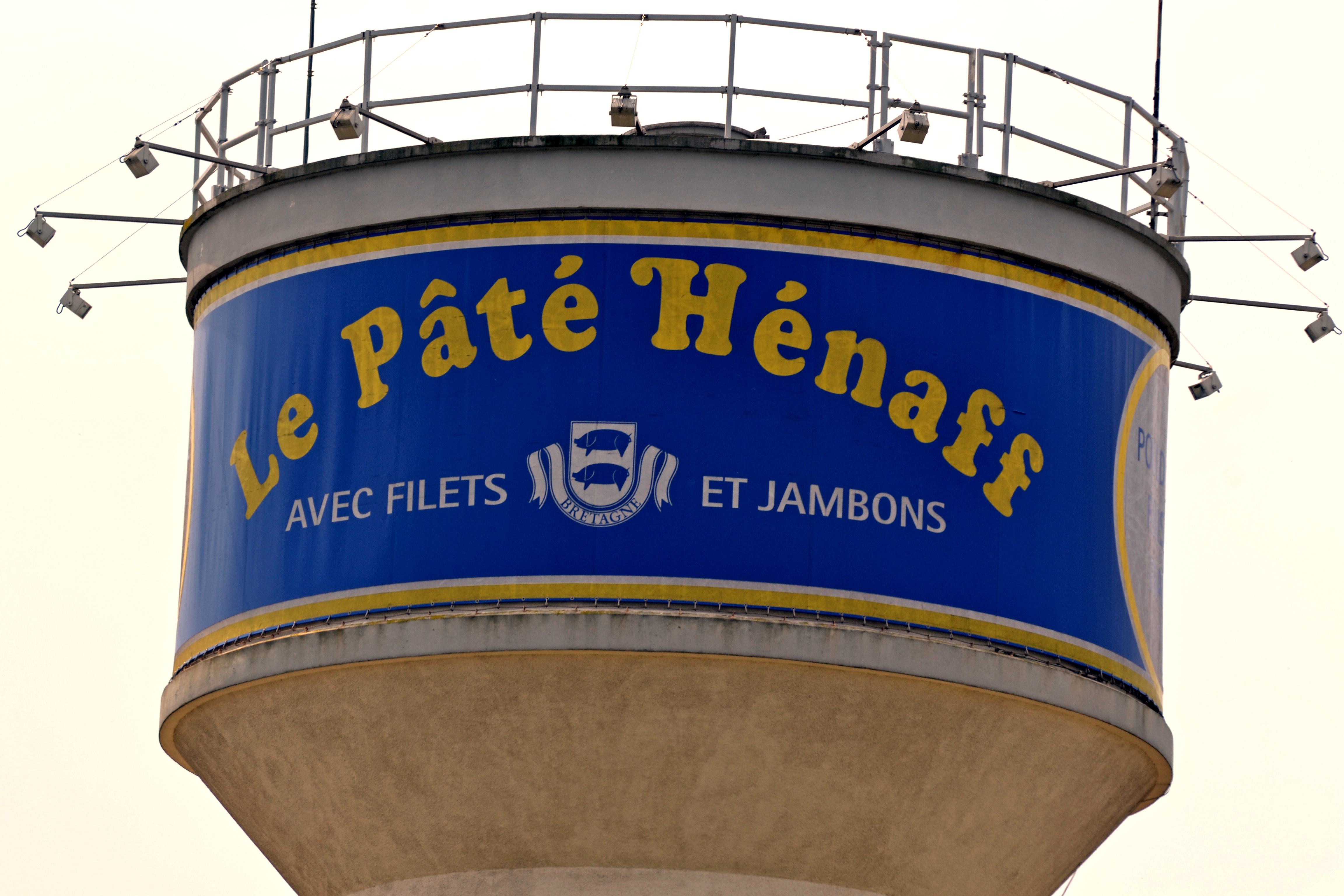 Château d'eau de l'usine Hénaff à Pouldreuzic, dont le réservoir est habillé à l'image d'une boîte de Pâté Hénaff.